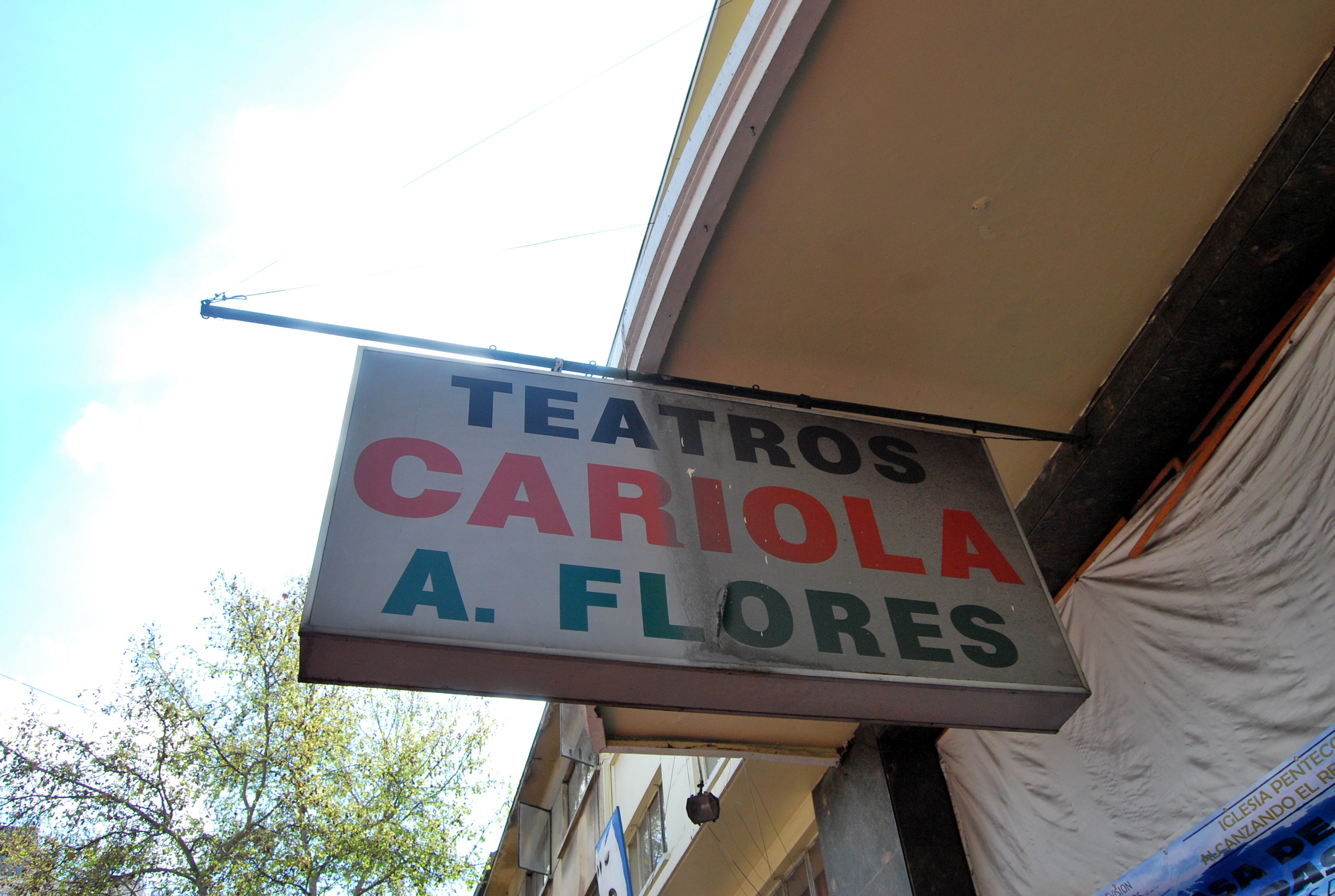 Teatro Cariola This is a photo of a national monument in Chile: 2223